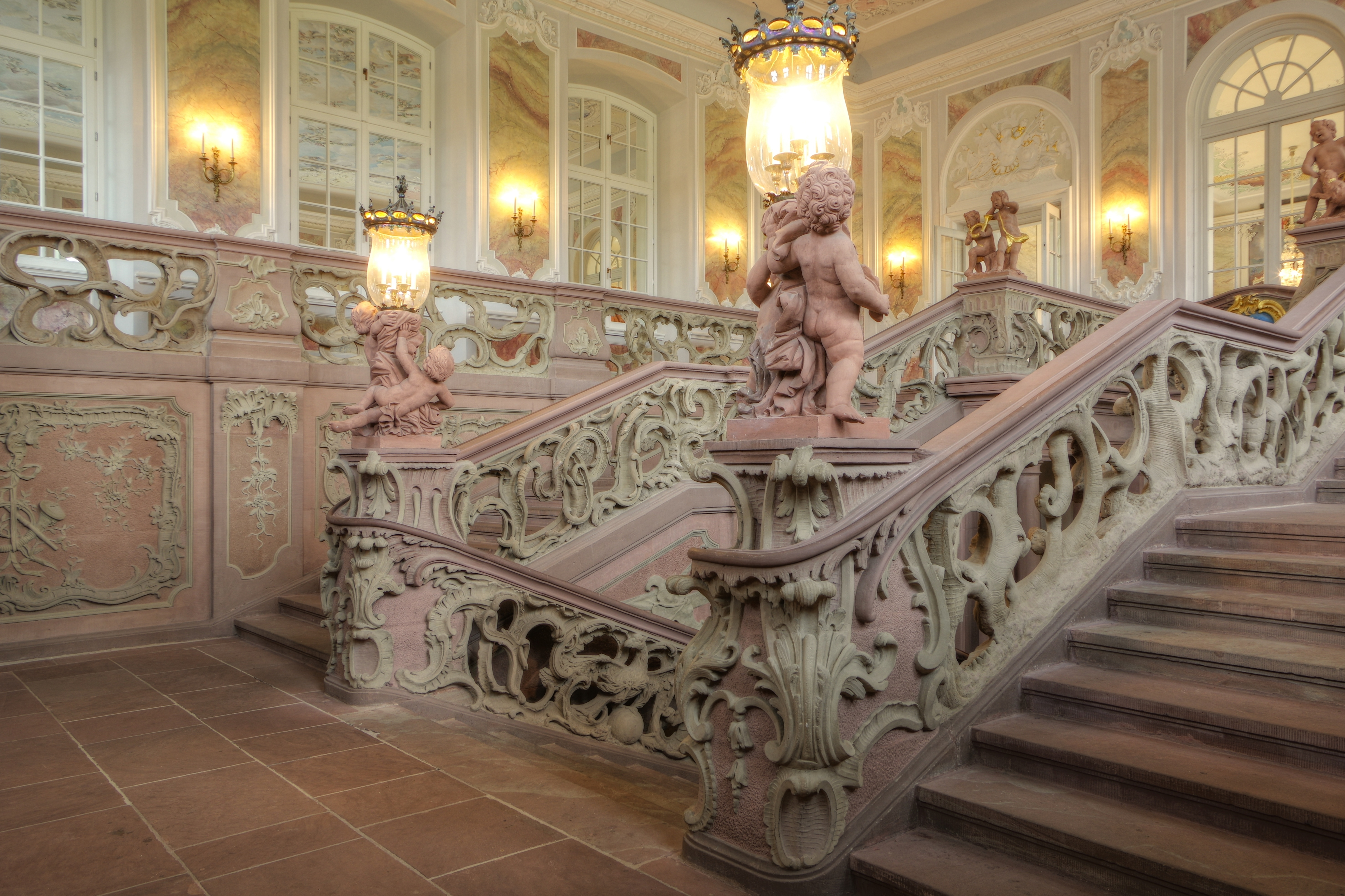 Denkmalzone ehemaliges kurfürstliches Schloss, Neubau des Rokokoschlosses durch Hofarchitekt Johannes Seiz: dreigeschossiger, 22-achsiger Gartenflügel mit Haupt- und Eckpavillon, 1757–61, Fassadenschmuck und Haupttreppenhausskulpturen von Ferdinand Tietz